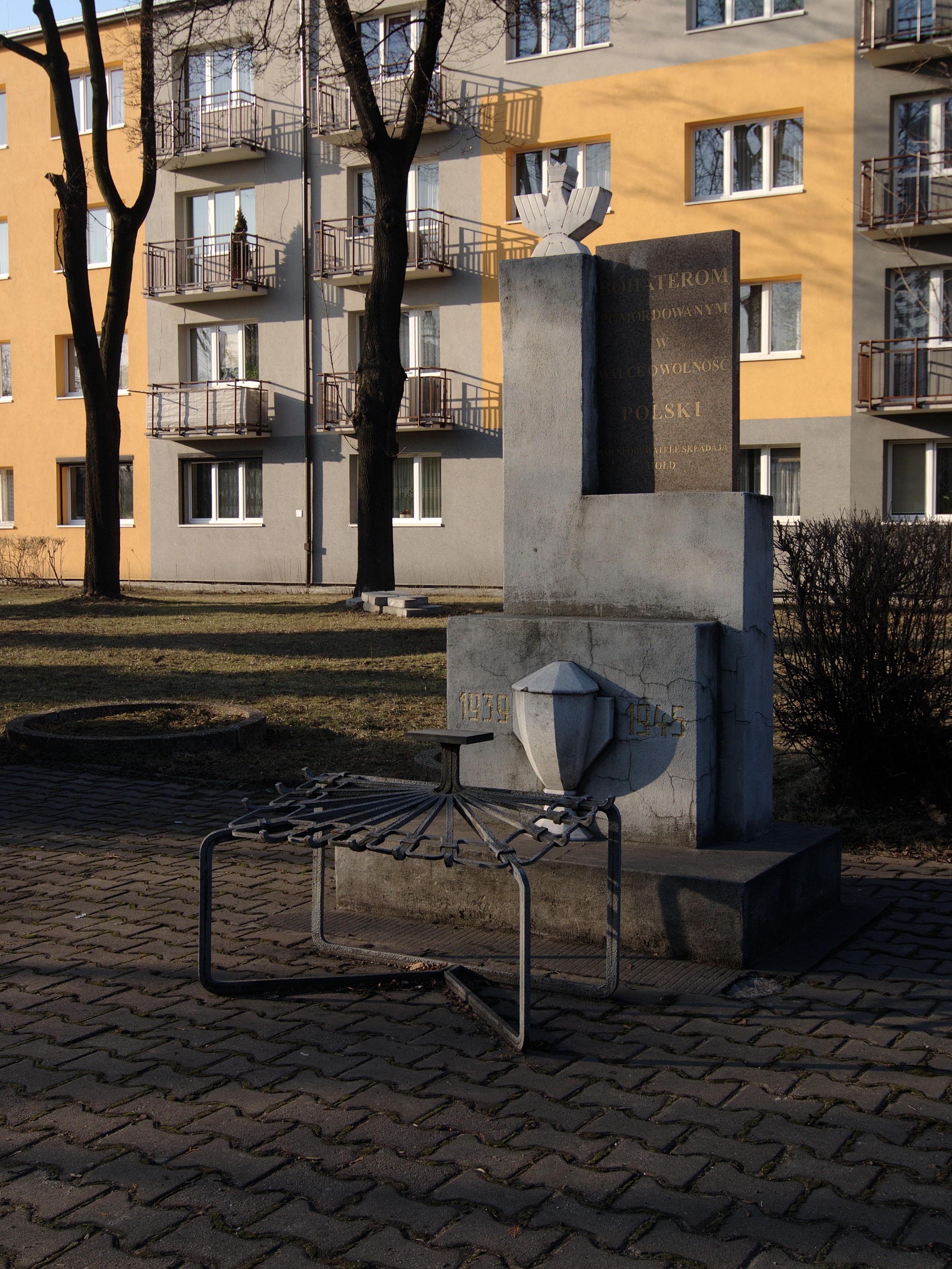 Ruda Ślaska. Pomnik "Bohaterom pomordowanym w walce o wolną Polskę".